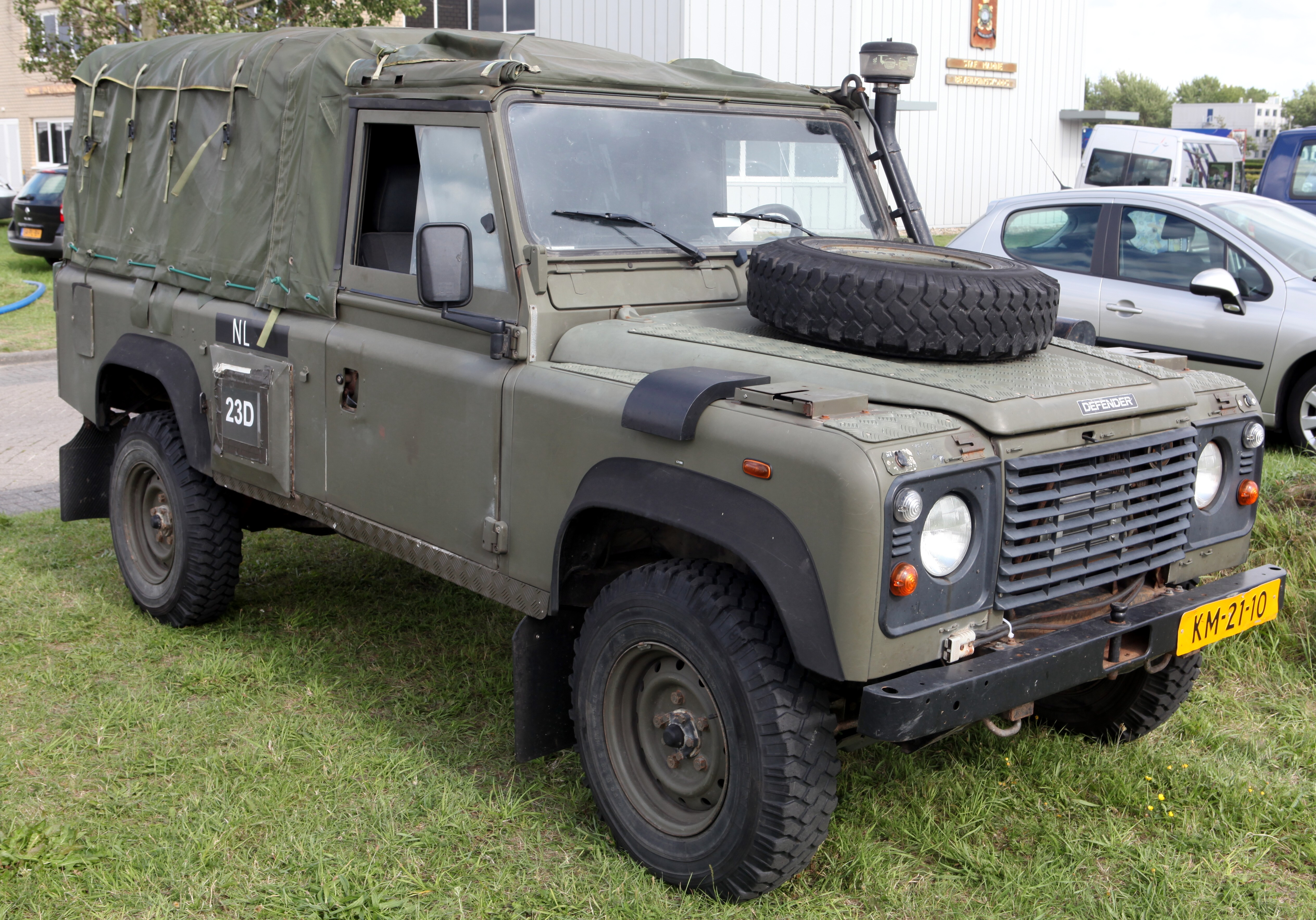 Land Rover Defender Netherlands Marine Corps